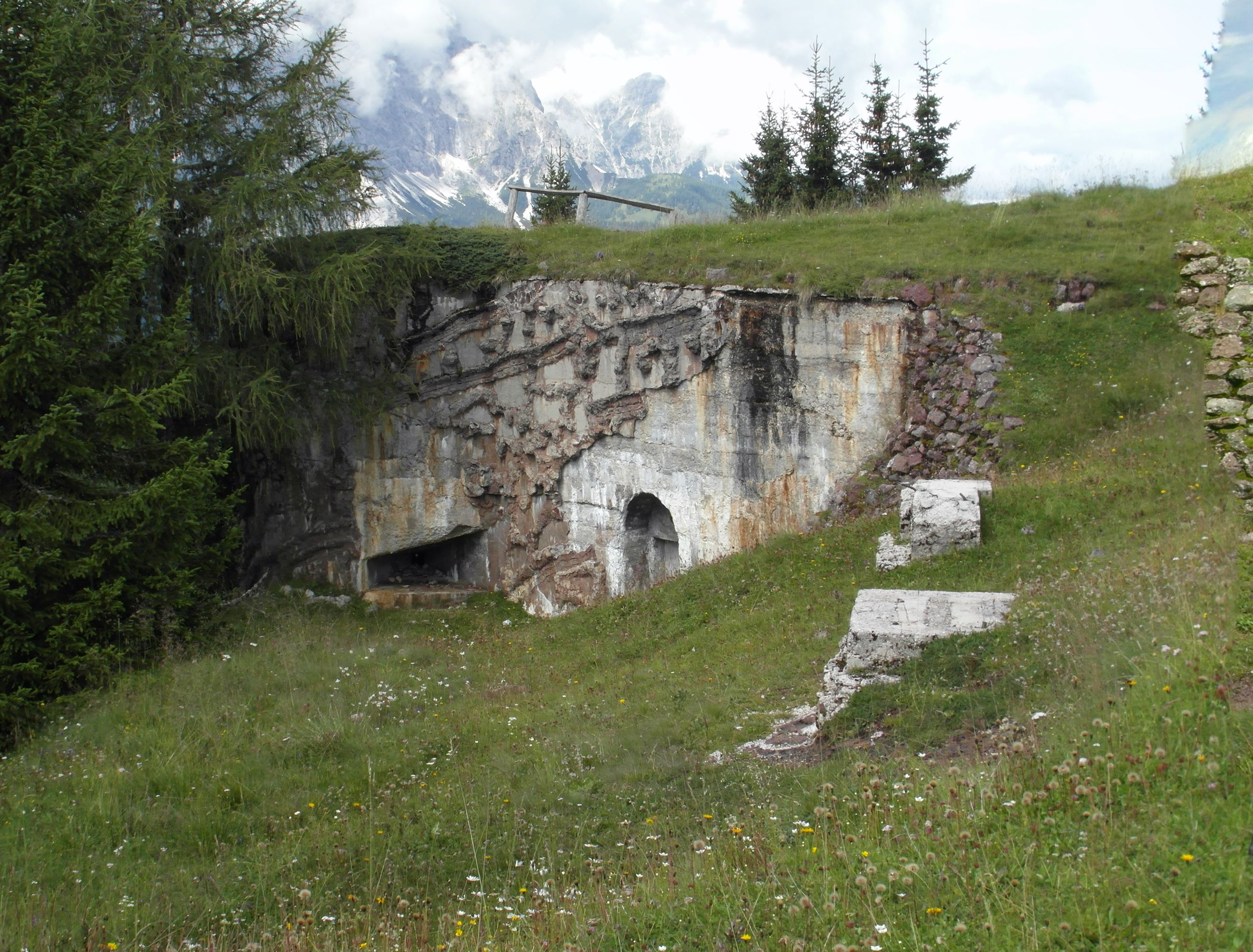 Opera 5 Sbarramento Alta Padola